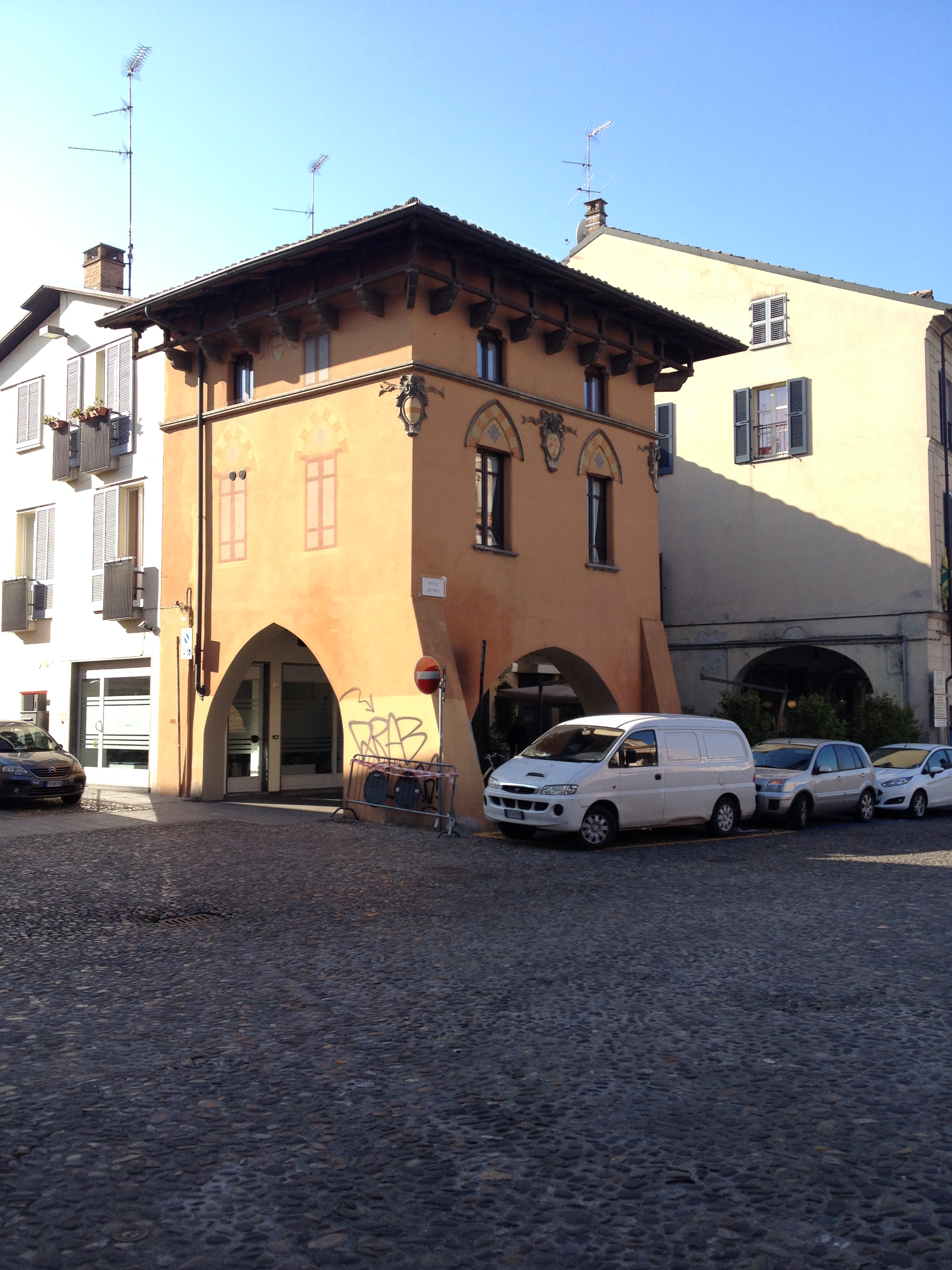 Veduta di Casa Nava a Voghera (PV)